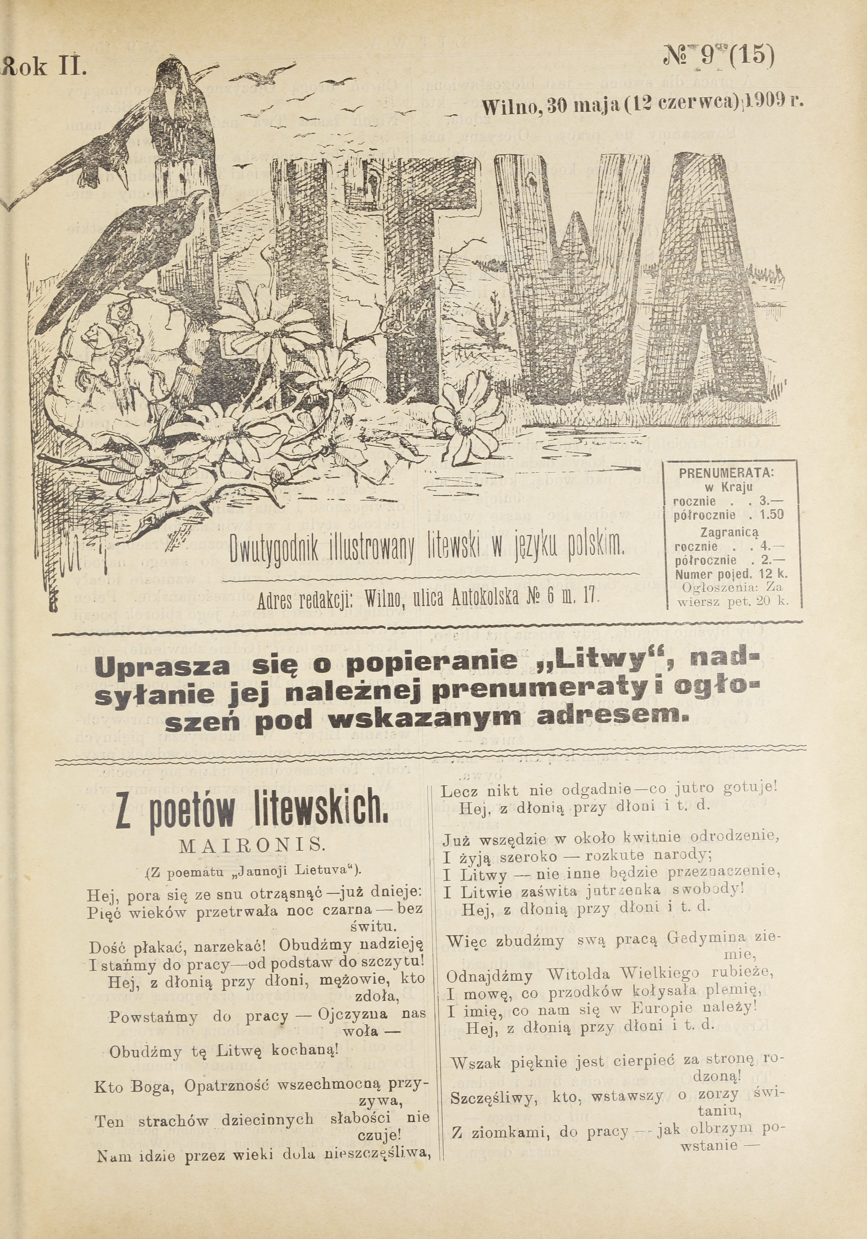 28 cm